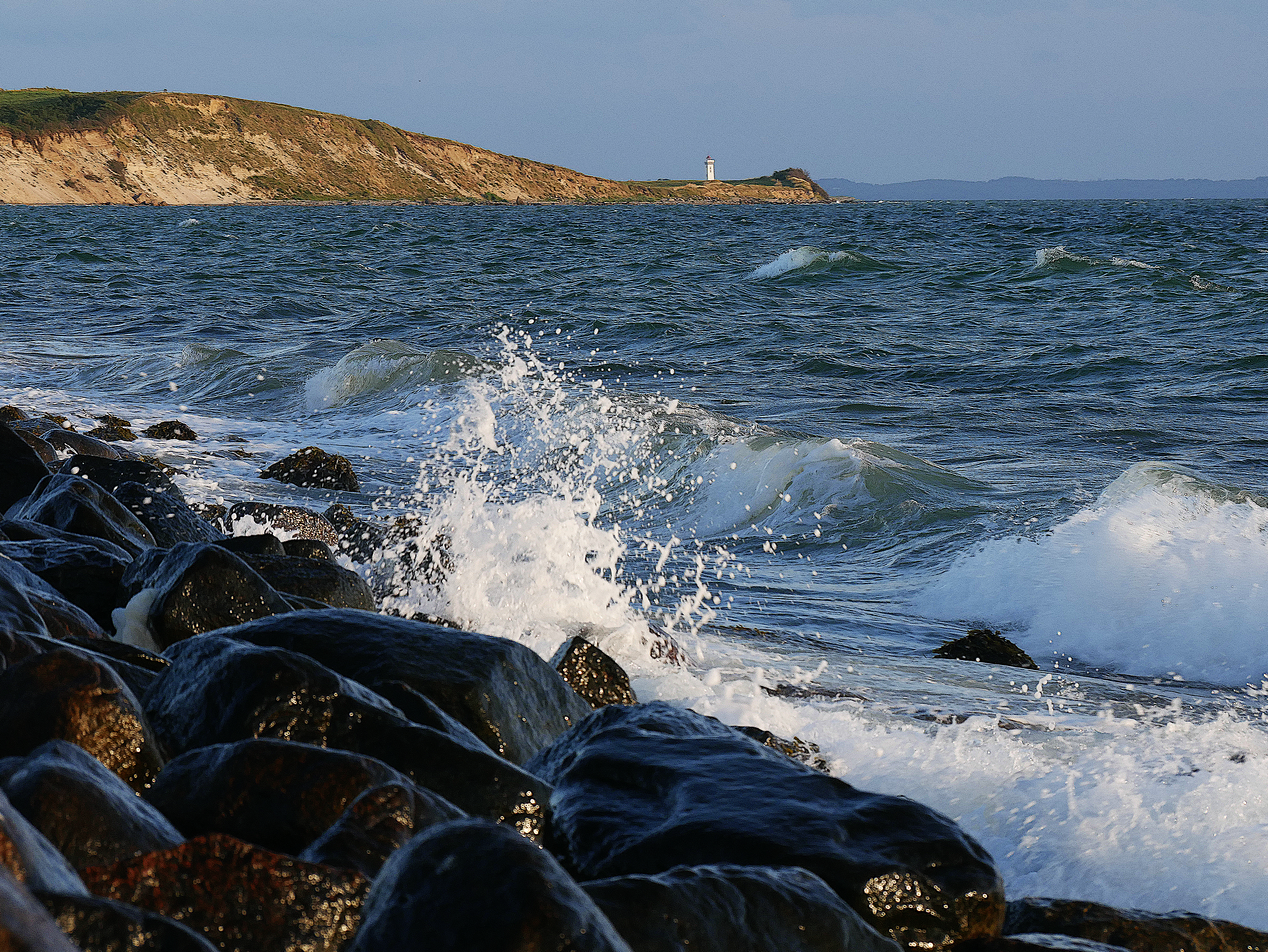 Leuchtturm von Helnæs, südlich von Fyn, vom Damm zwischen Helnæs und Fyn, im Vordergrund die Bobakker Klippen